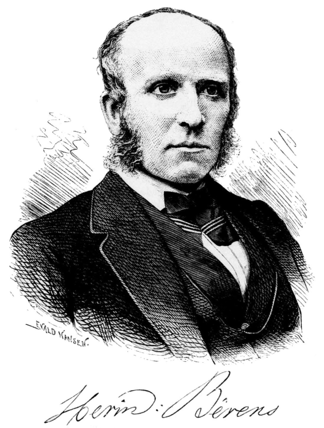 Herman Berens (1826-1880)